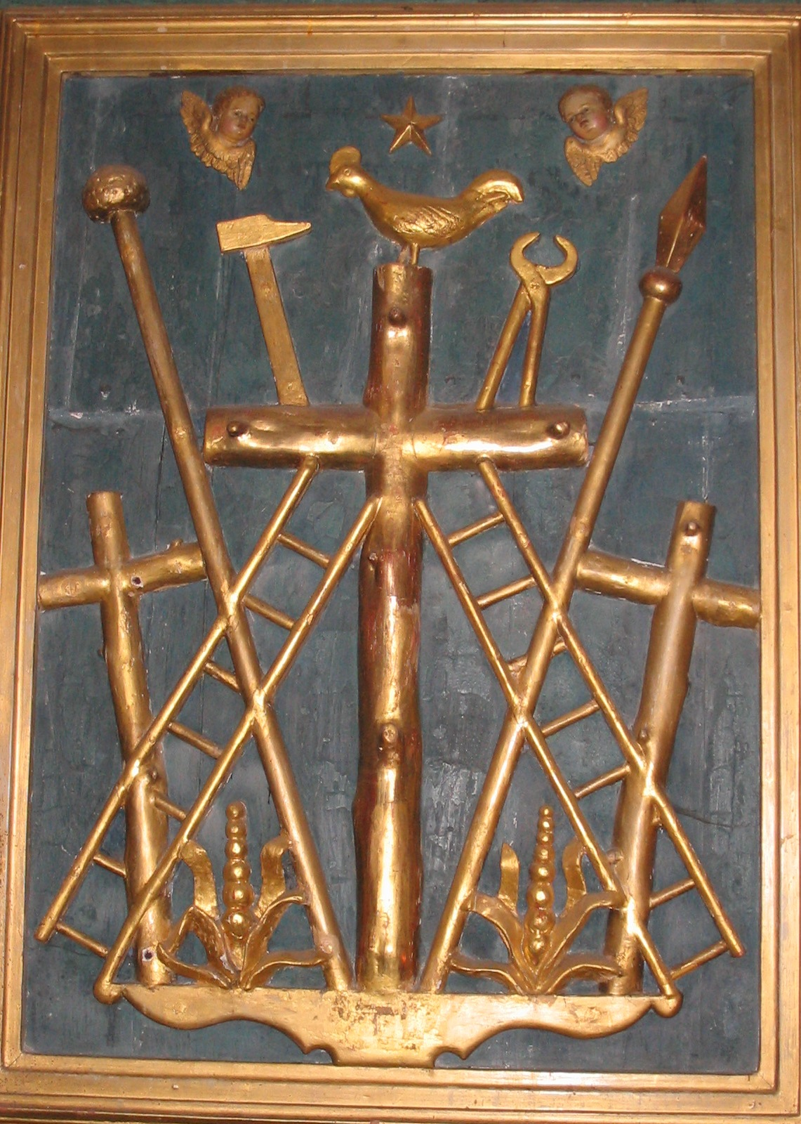 Les instruments de la Passion, église Saint-Pierre de Collonges-la-rouge.